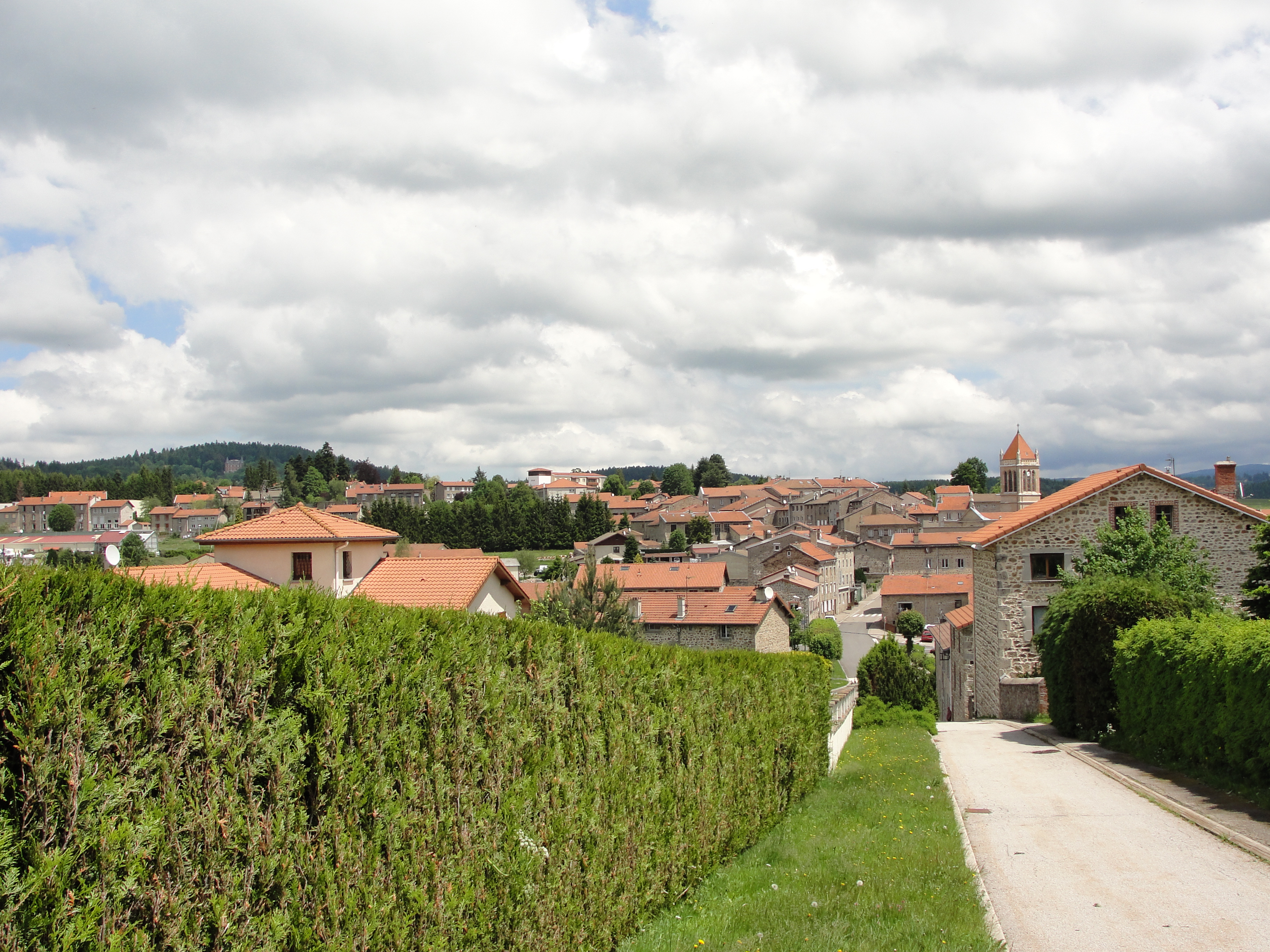 St-Genest Malifaux (Loire).